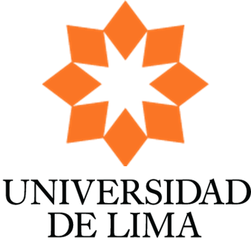 Diseño inspirado en el logo de la Universidad de Lima